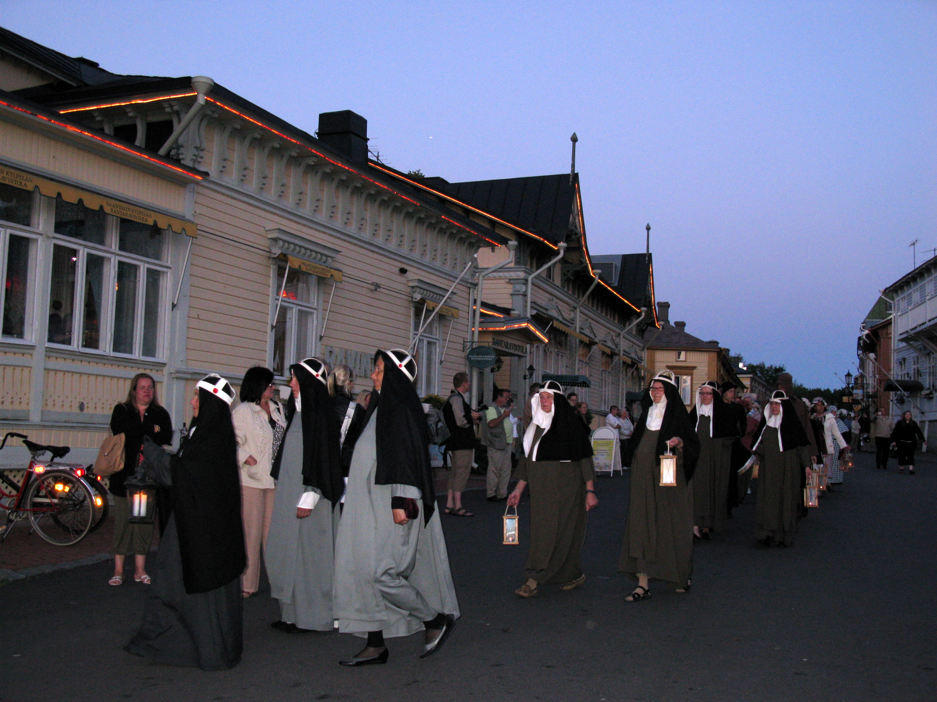 Birgitan kulkue Birgitan yö -tapahtumassa Naantalissa.